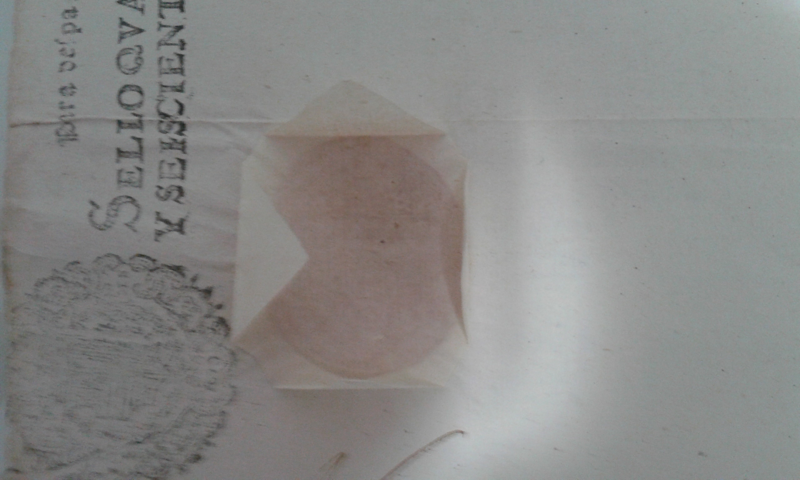 Sello de placa de la casa de Medina Sidonia, datado en el siglo XVII. Procedente de colección privada.